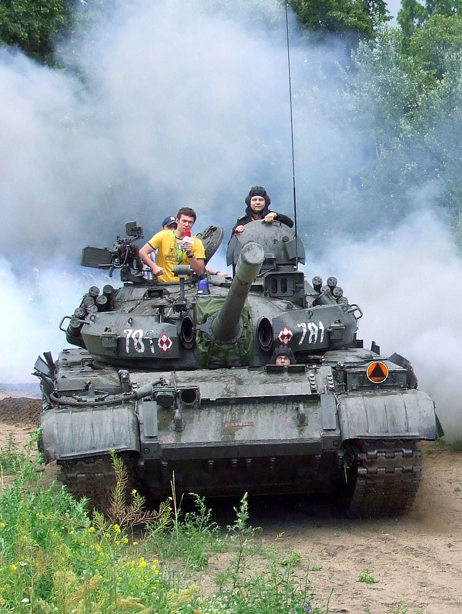 T-55AM, Muzeum Polskiej Techniki Wojskowej